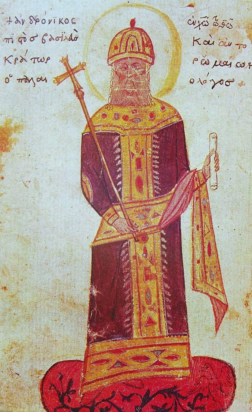 Andronikos II Palaiologos, Byzantine emperor (1282-1328)